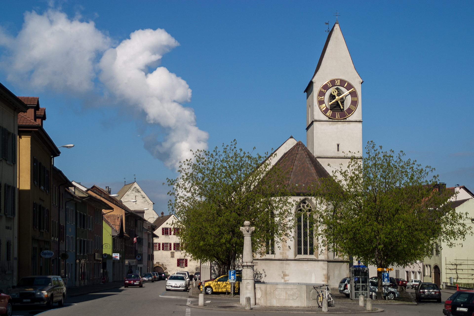 Dorfzentrum von Klingnau (AG)